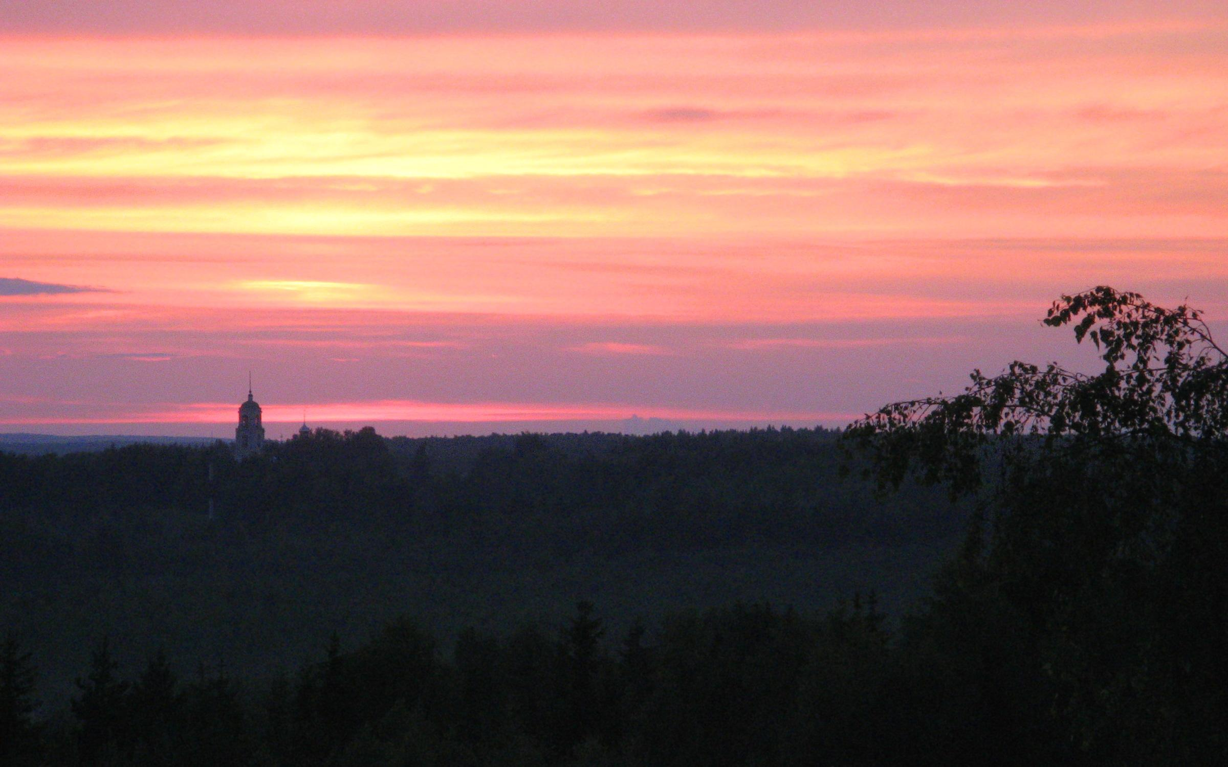 Вид на Никольскую церковь в селе Вашка (Ярославская область) со стороны села Рушиново. Никольская церковь представляет собой довольно редкое в наше время явление. Эта церковь в советское время не подверглась разорению, хотя и была закрыта. Уцелела она благодаря консервации. Поскольку полной реставрации церковь не подвергалась много десятилетий, все в ней несколько обветшало. Но старинный иконостас и древние иконы сохранились почти нетронутыми с дореволюционных времен.